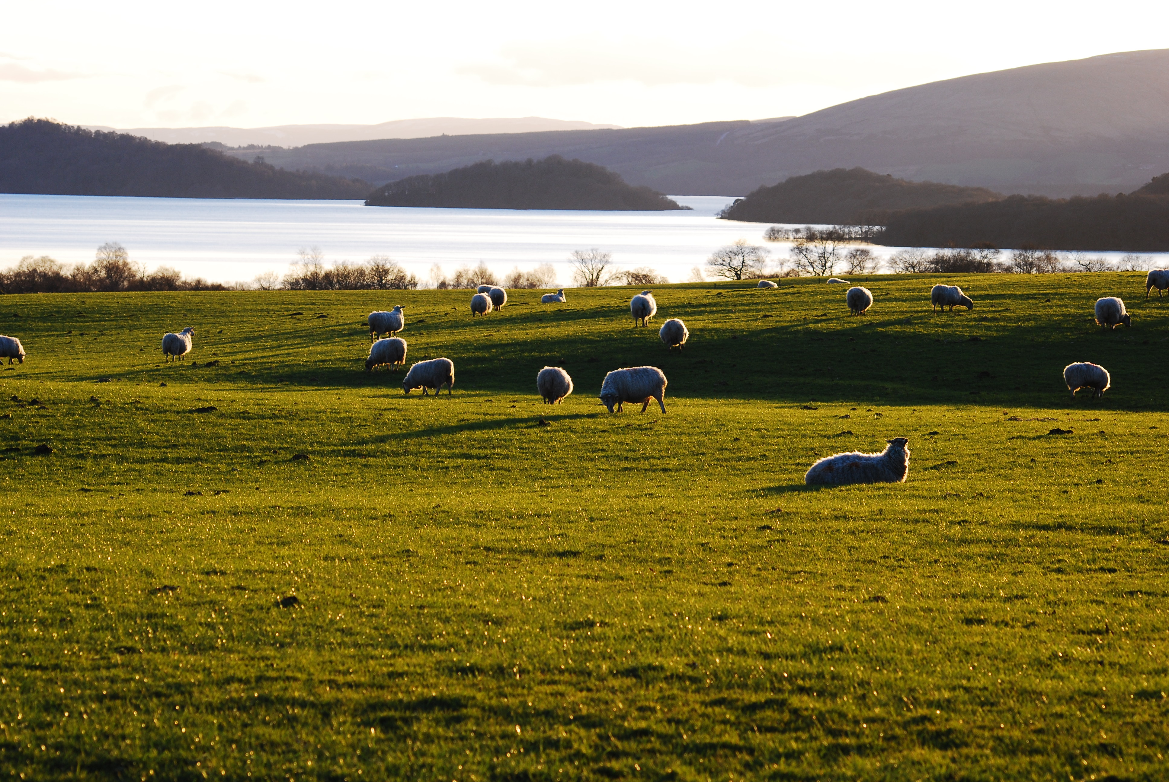 sunset on Loch Lomond